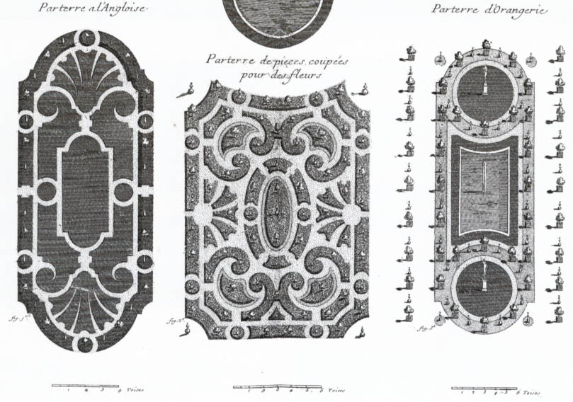 Diseño de parterres de Antoine Joseph Dezallier d'Argenville, publicado en La Théorie et la Pratique du Jardinage (1710).